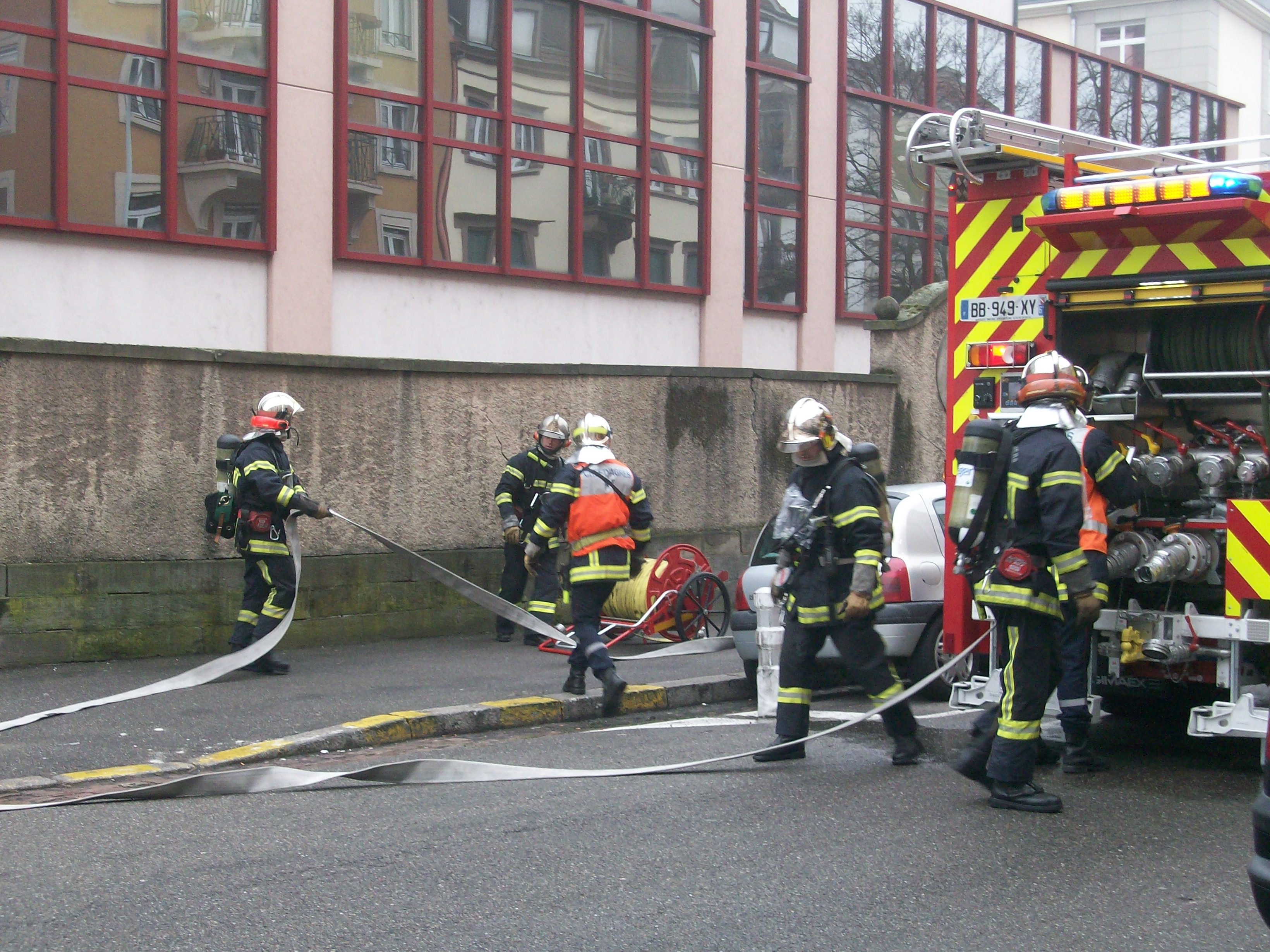 Sapeurs-pompiers en exercice à Strasbourg - février 2011